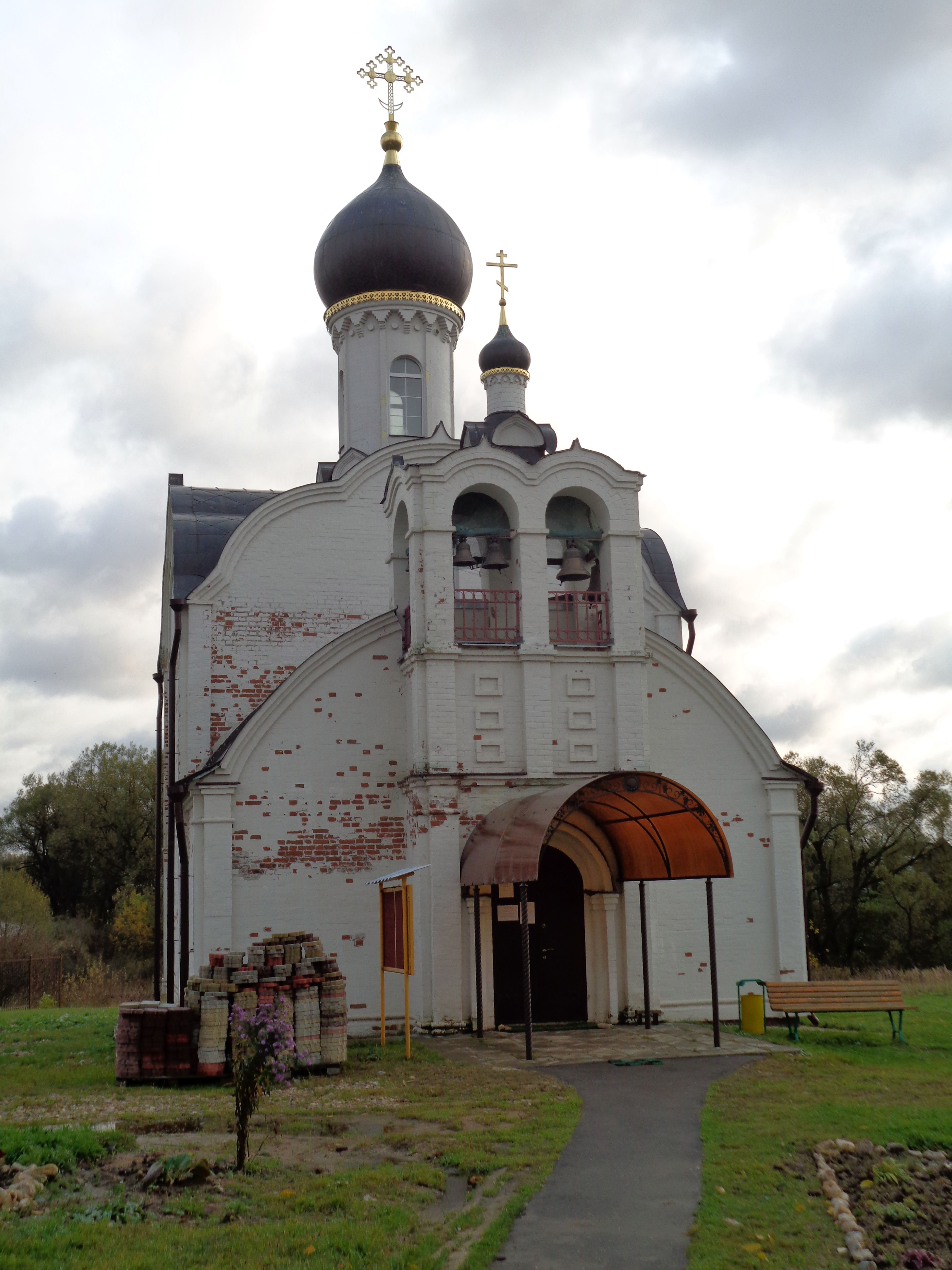 Церковь Михаила Архангела в посёлке совхоза «Архангельский»